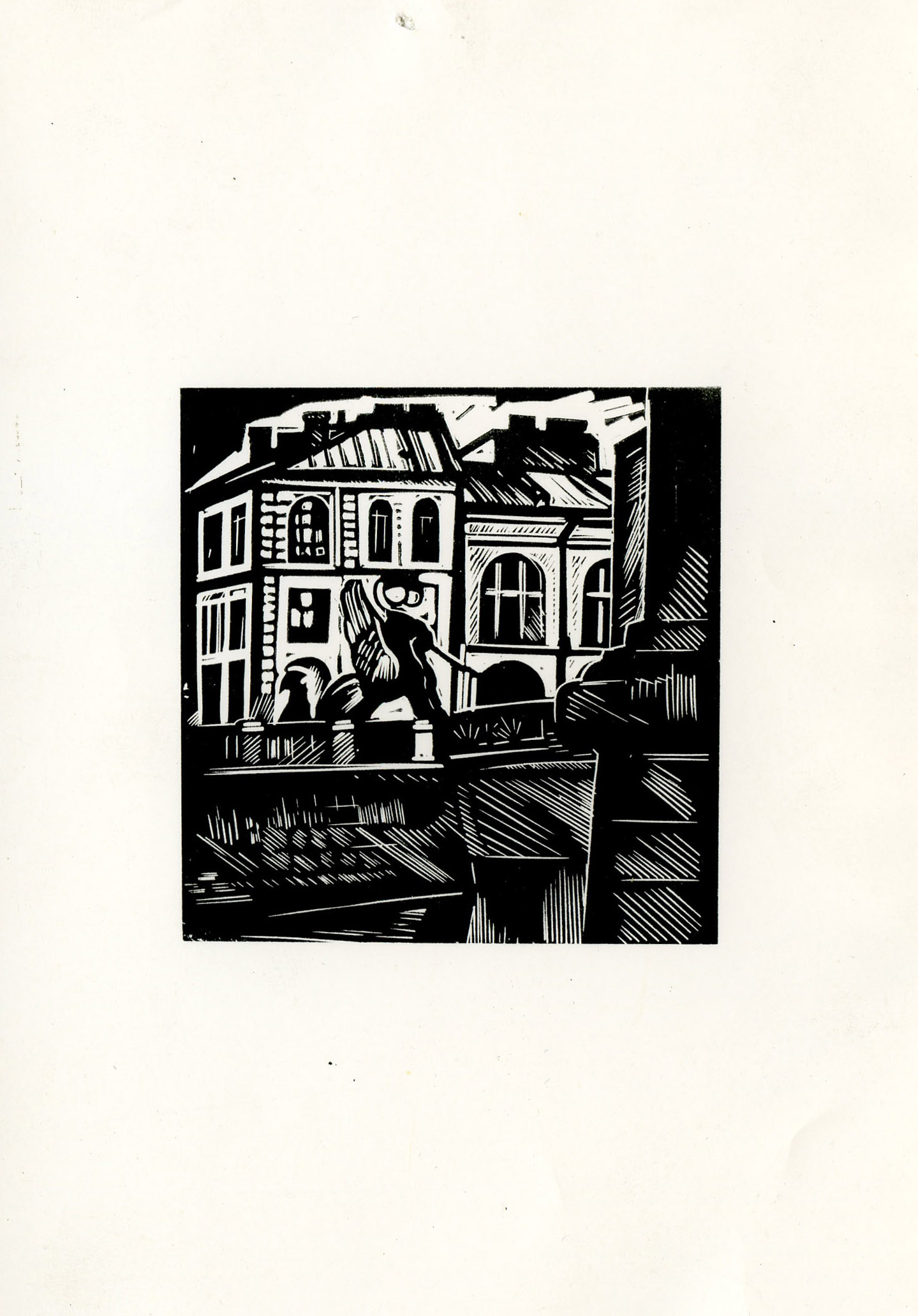 Банковский мост. Из серии гравюр «Петербург-Ленинград» (М. А. Курушин)